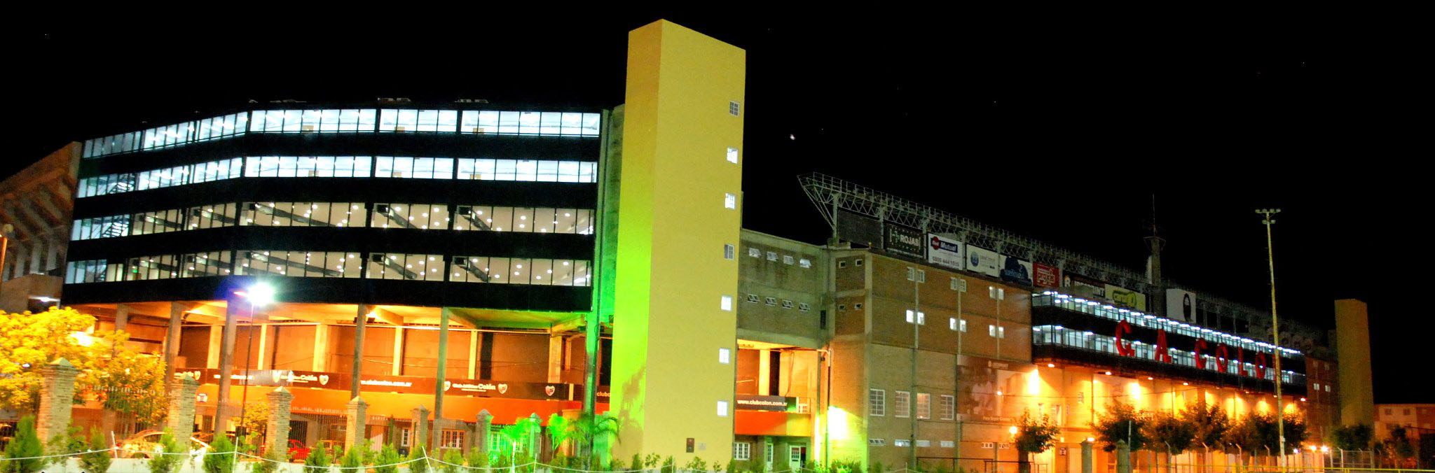 Foto tomada desde el estacionamiento del estadio.